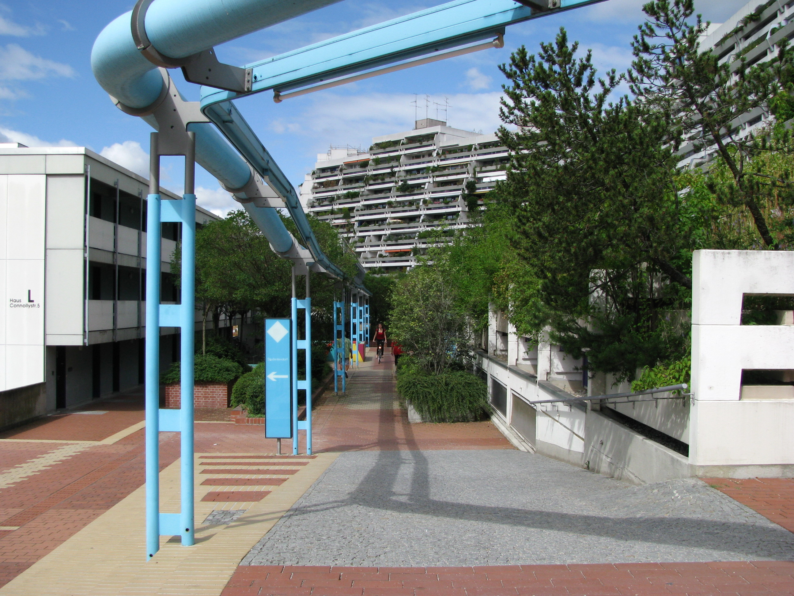 Connollystraße